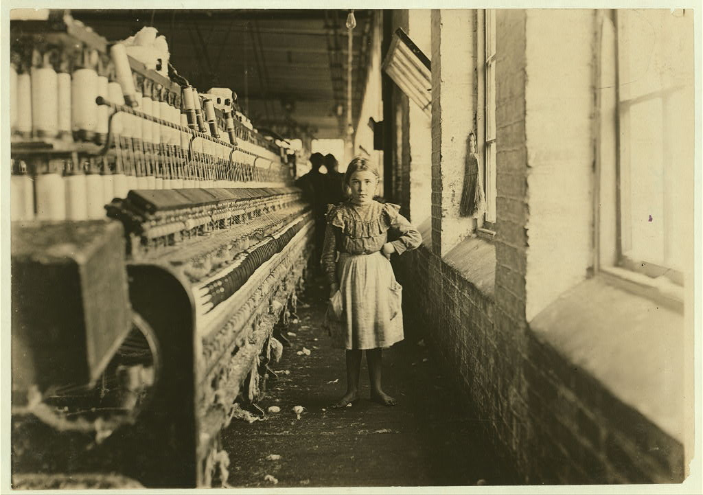 A little spinner in a Georgia Cotton Mill. Location: Georgia.